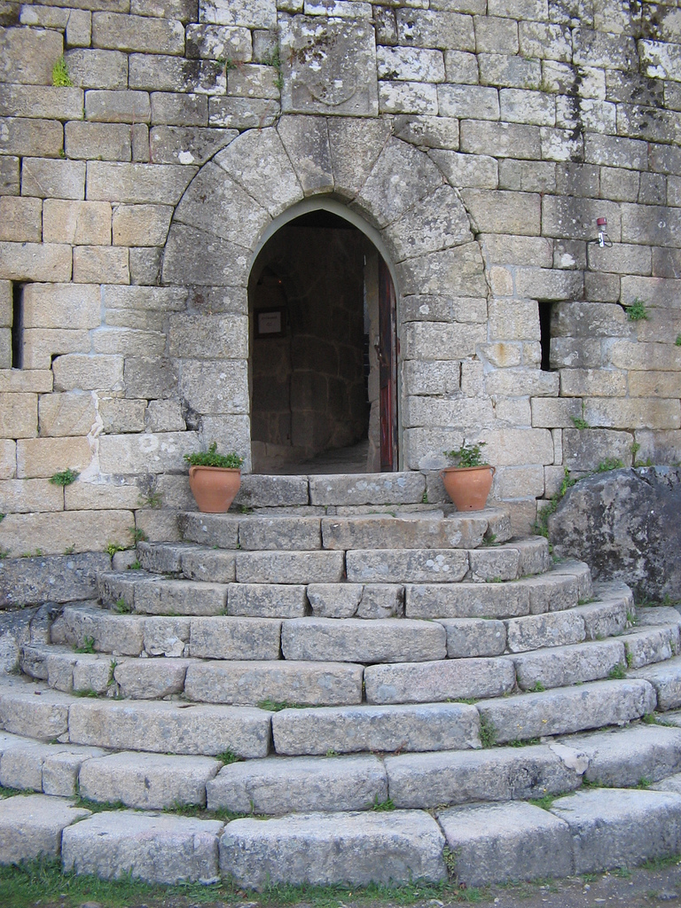 Castelo de Sobroso, Mondariz, Galicia